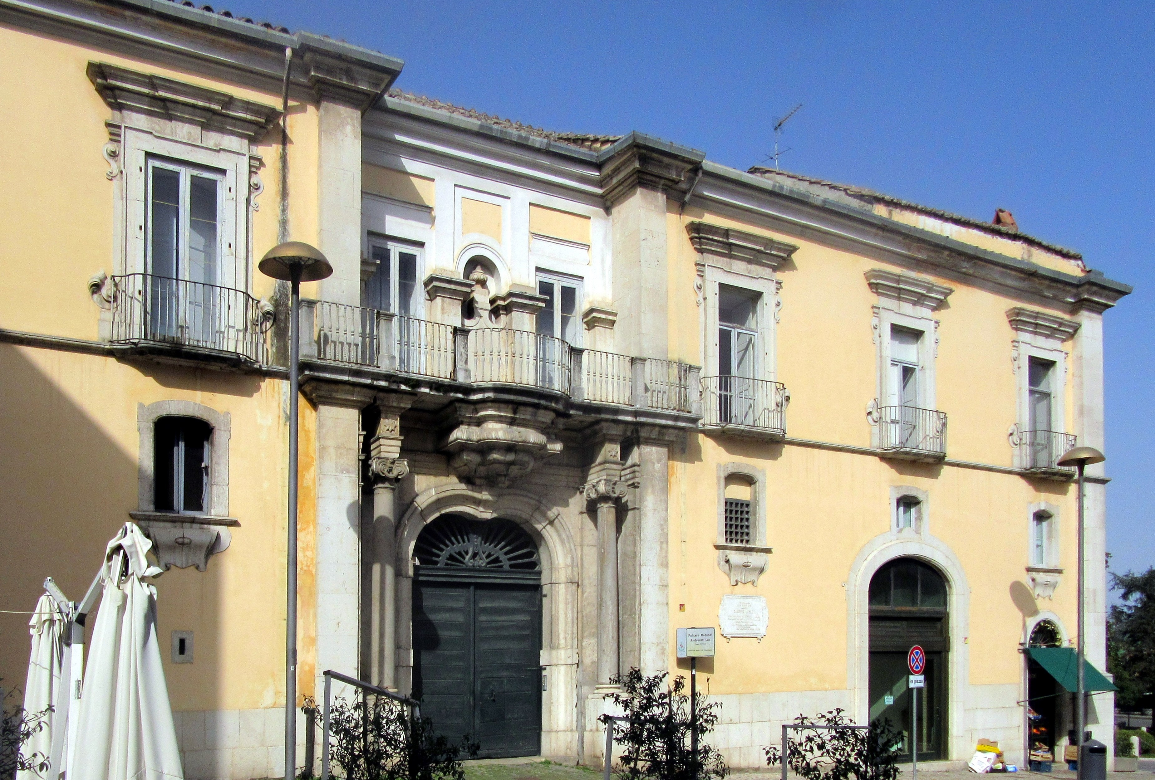 Benevento, Palazzo Rotondi Andreotti Leo, casa natale Giuseppe Moscati